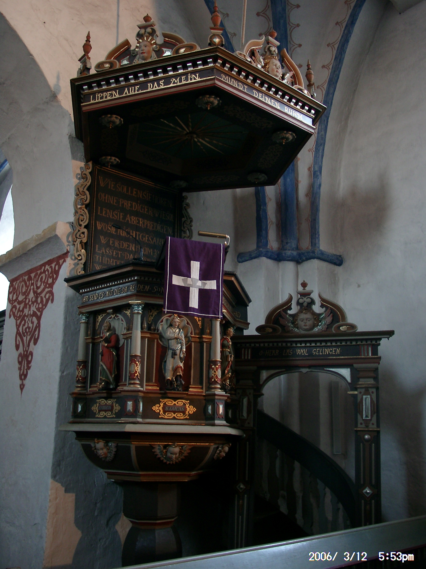 Kanzel in der Wiefelsteder St. Johannes Kirche